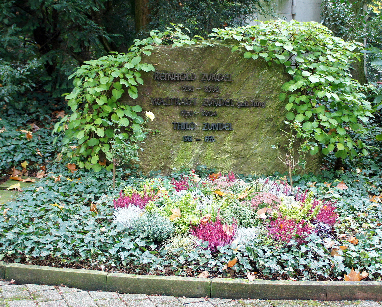 Zundels Grab in Heidelberg